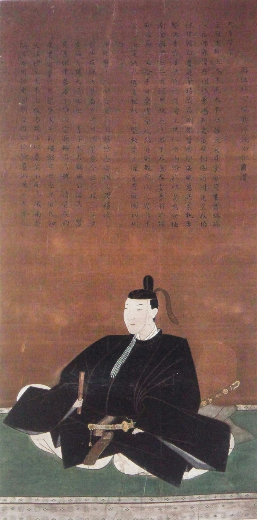 蜂須賀綱通の肖像。